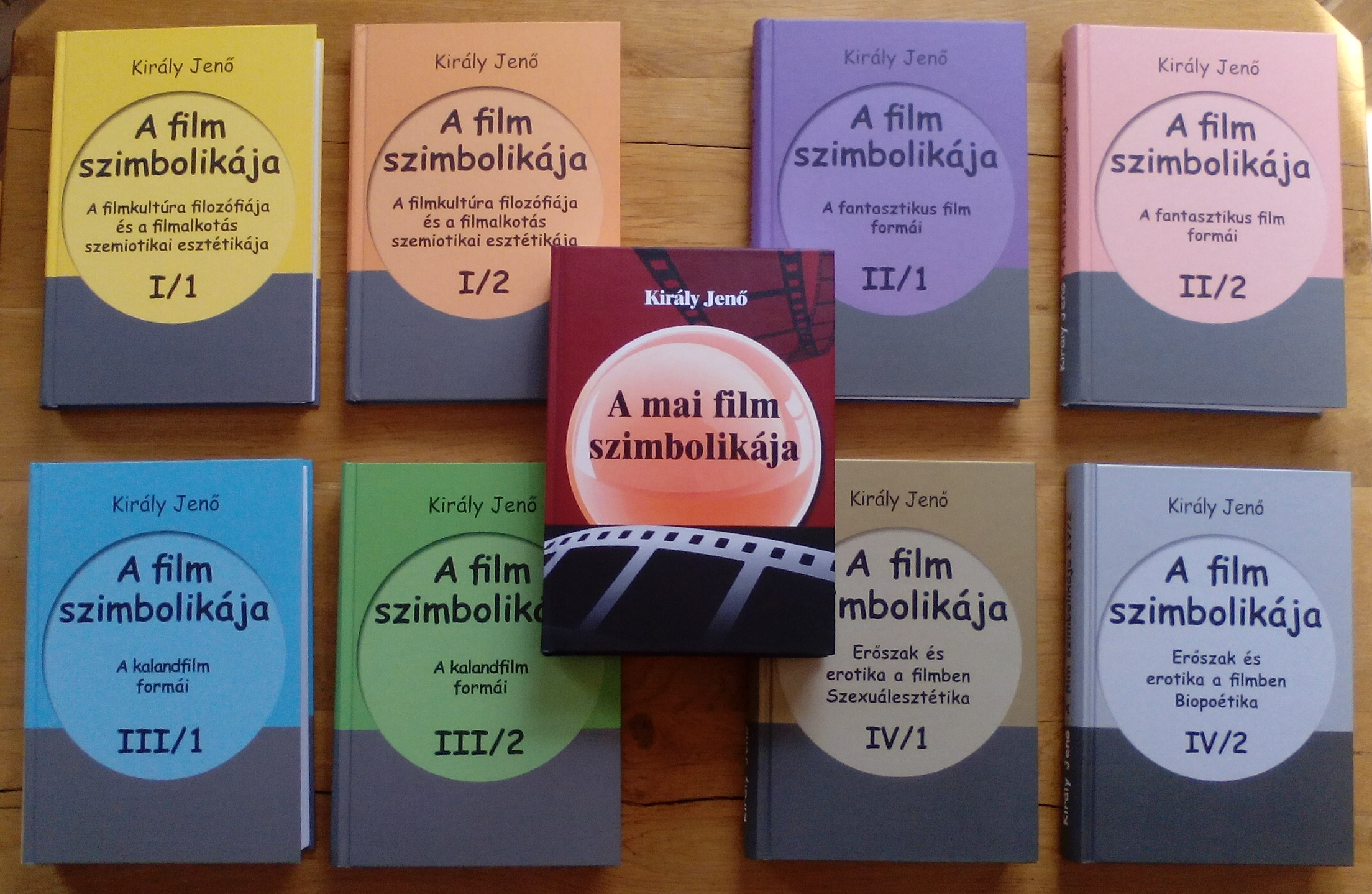 könyvborító